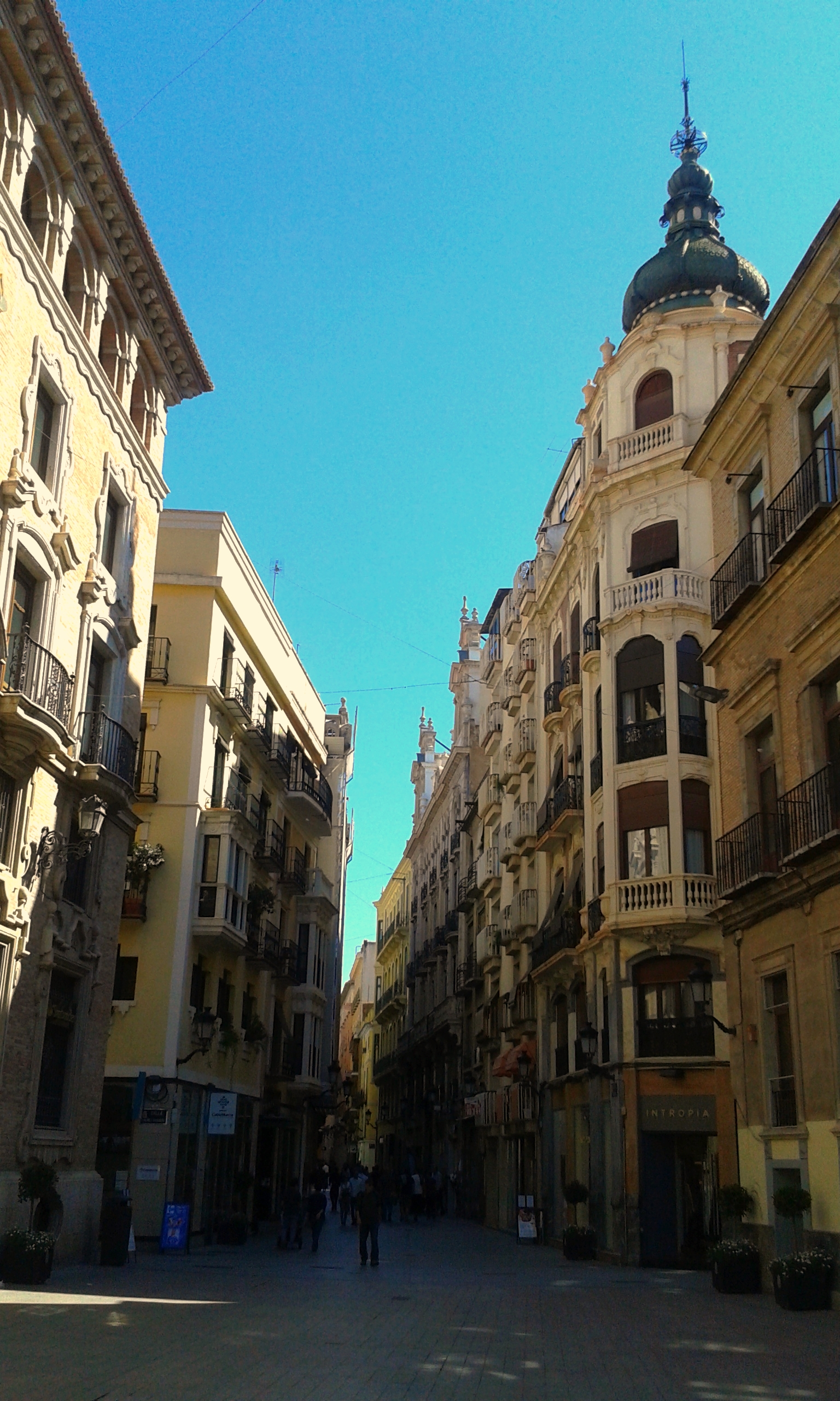 Calle de la Trapería (Murcia)